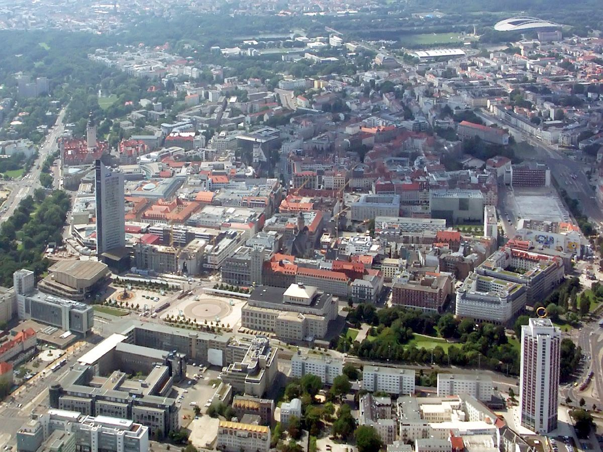 Leipzig. Die Innenstadt von Osten gesehen. Vorn rechts das Wintergartenhochhaus, dahinter der Ring. An diesem in Richtung Mitte des Bildes das Opernhaus mit dem Augustusplatz und gegenüber, am anderen Ende des Augustplatzes dem Gewandhaus. Rechts vom Gewandhaus der Universitätscampus mit ehemaligem Universitäts- heute Cityhochhaus. Vorn links das Europahochhaus, daneben der aus DDR-Zeiten stammende, nach der Wende neu gestaltete Bau des Hotel Interflug, heute Radisson Blu am Augustusplatz, der renovierte Altbau dahinter sind die Kommunalen Wasserwerke Leipzig. Rechts vom neugestalteten Radisson Blu das Ensemble der Hauptpost von hinten mit Neubau der Telekom.Gebäude an der Ecke Grimmaischer Steinweg / Querstraße.